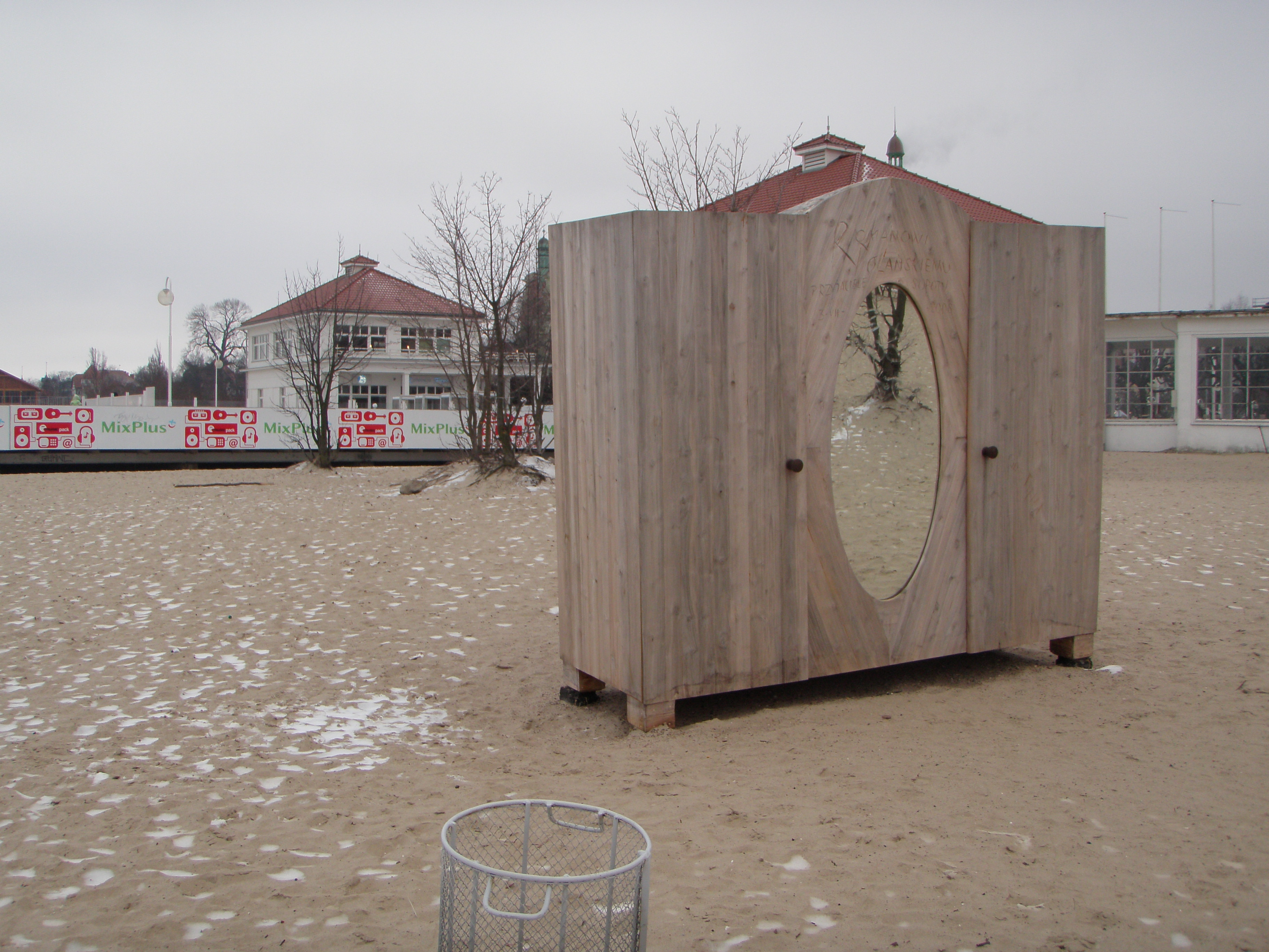 Sopot. Pomnik na plaży: szafa, dla upamiętnienia zrealizowanego m.in. w Sopocie filmu Romana Polańskiego "Dwaj ludzie z szafą".